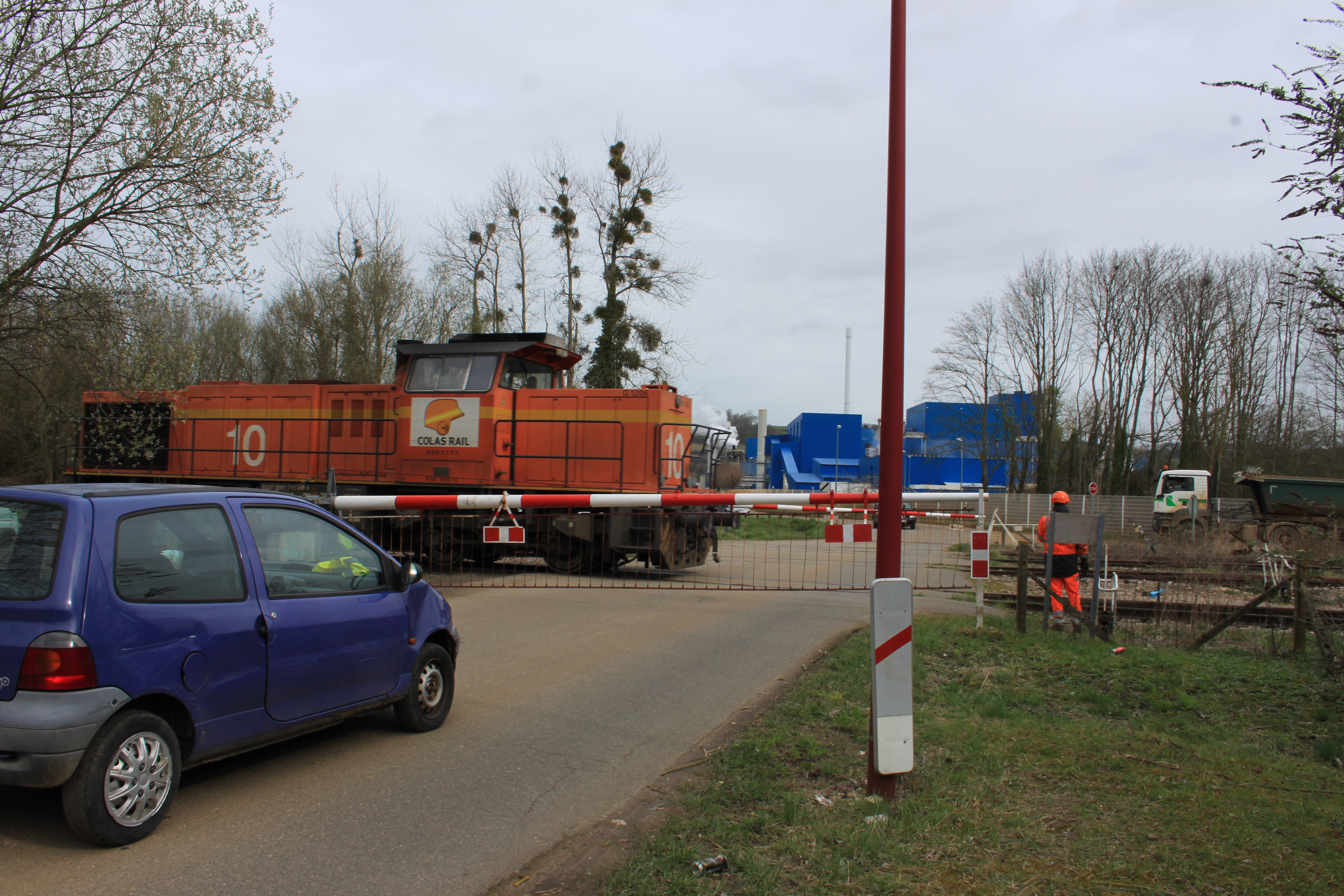 Passage à Niveau manuel